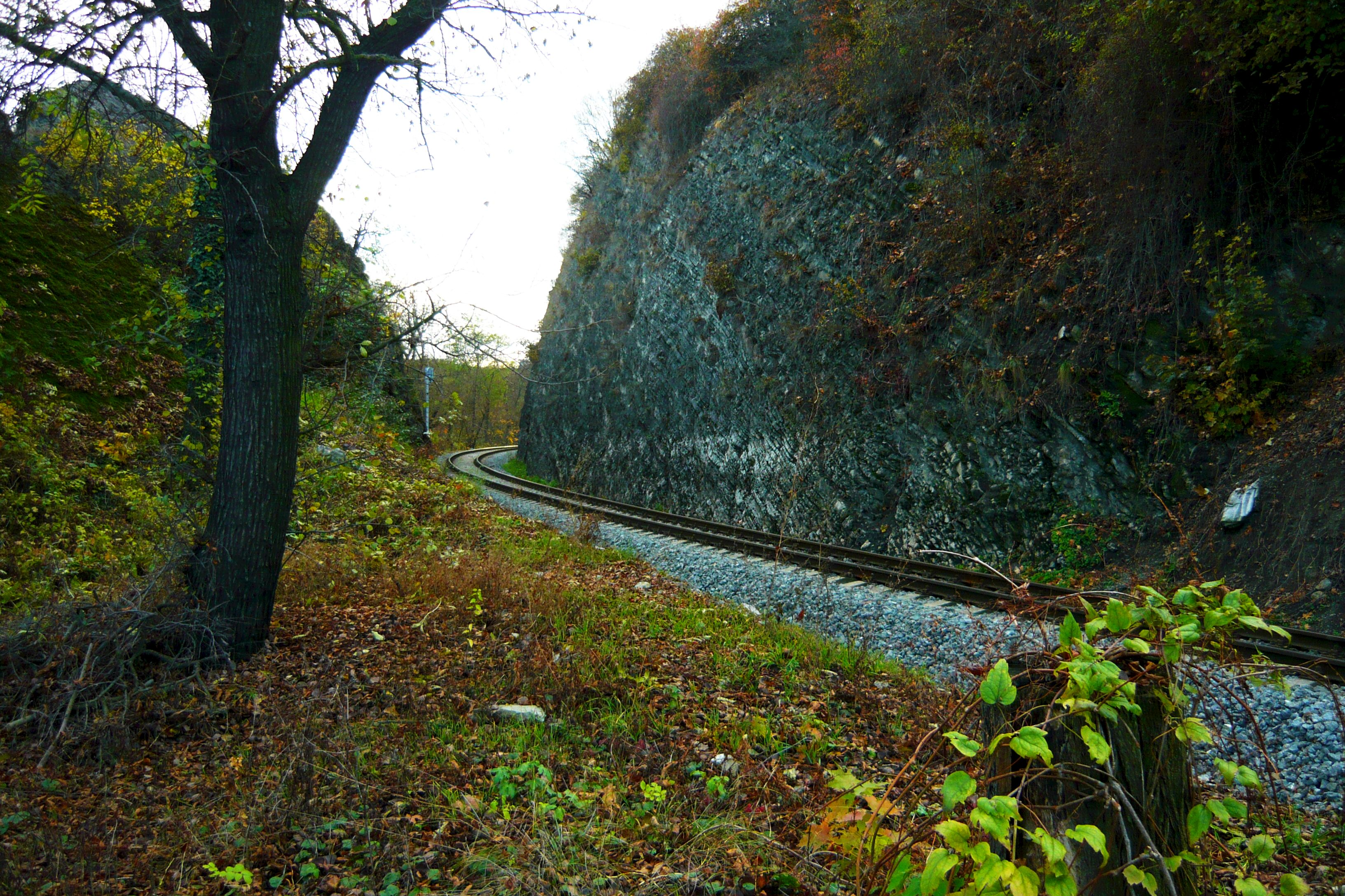 Snímek reprezentující železniční předěl geologického útvaru PP Pod Žvahovem